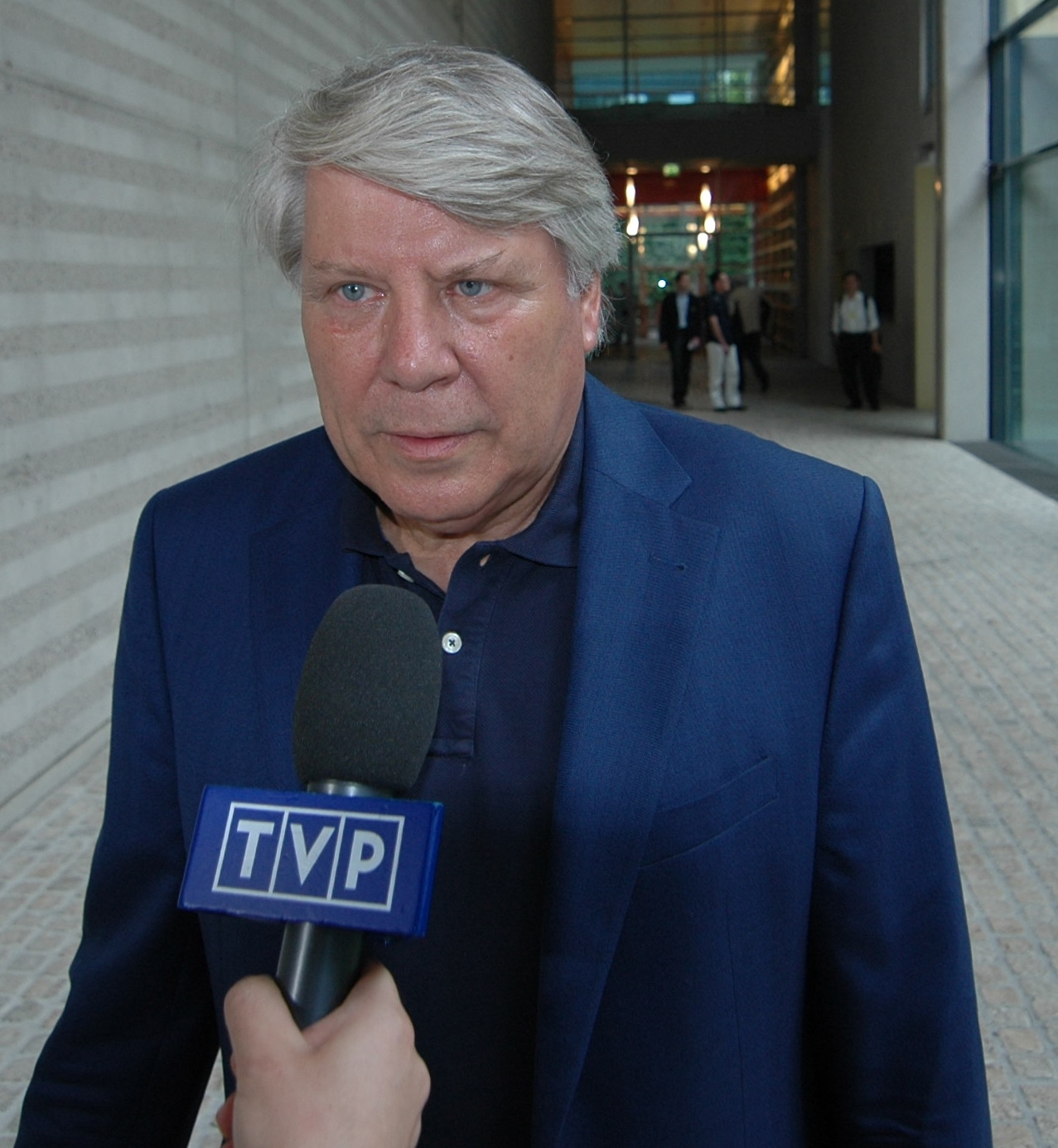 Prof. Dr. Gunter Gebauer, FU Berlin, beim Interview des Polnischen TV-Senders TVP in der Französischen Botschaft am Pariser Platz in Berlin